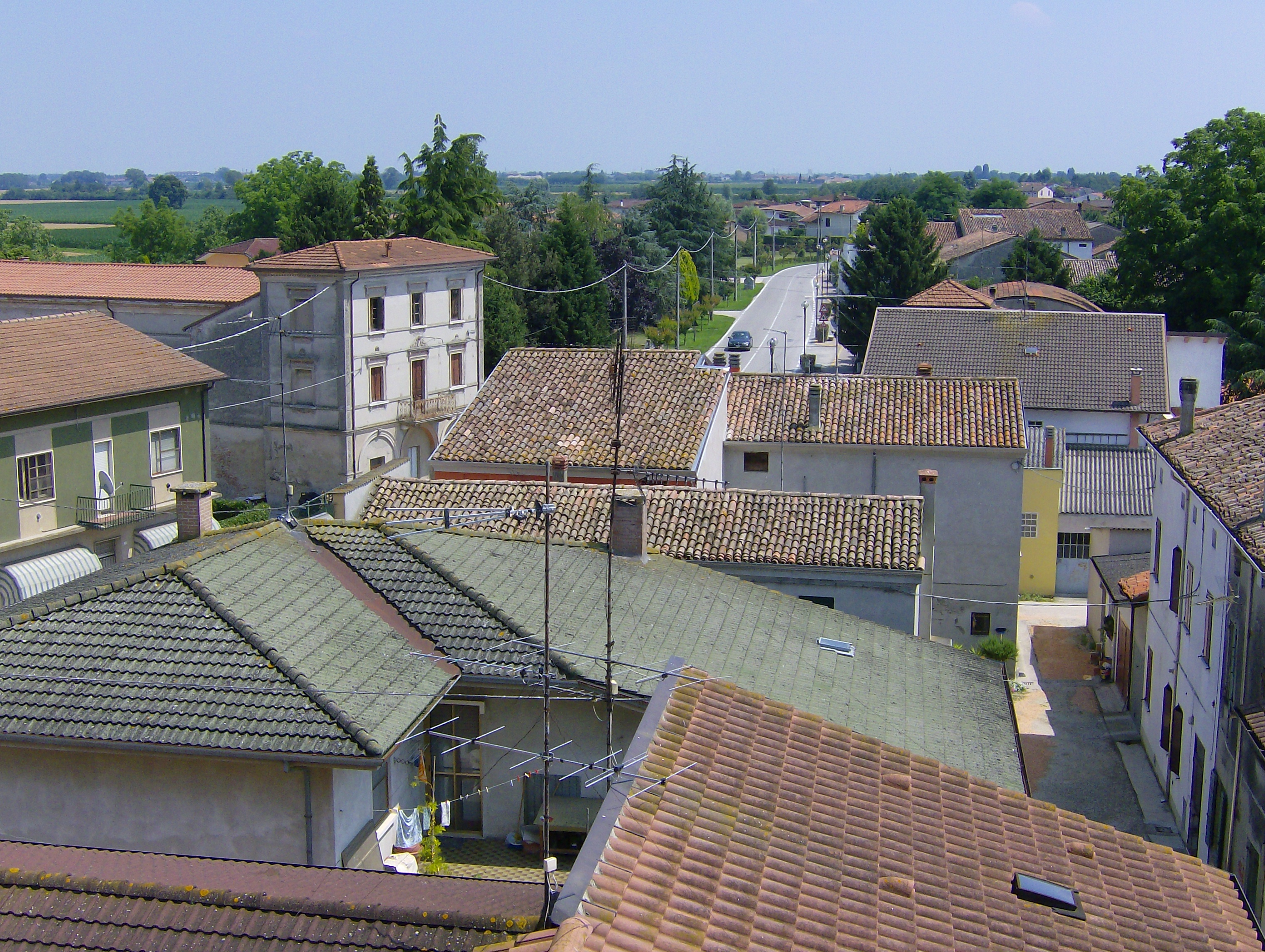 Case a Schivenoglia